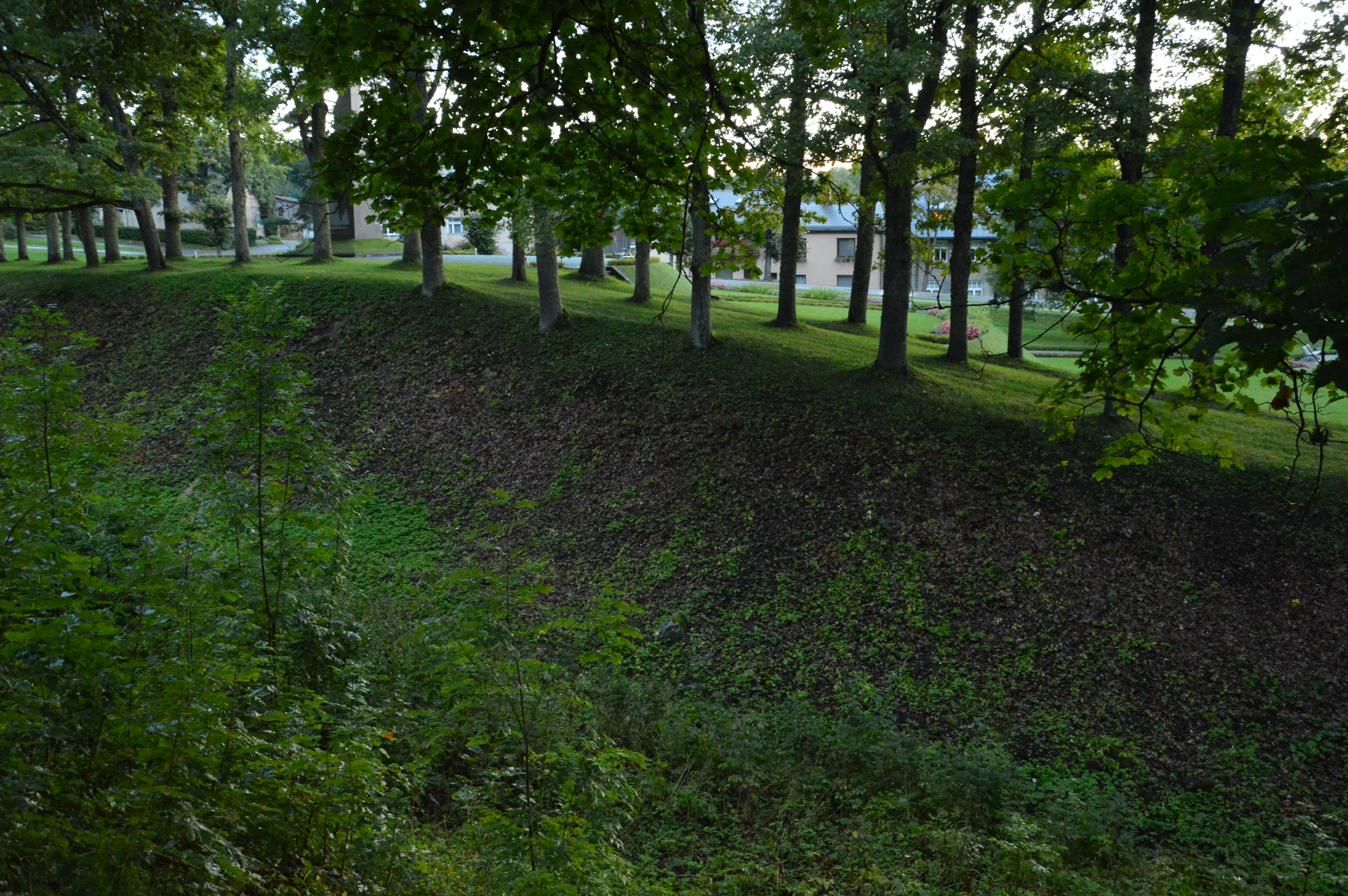 Rauna piiskopilinnus. Pildistatud linnuseni viivalt trepilt.